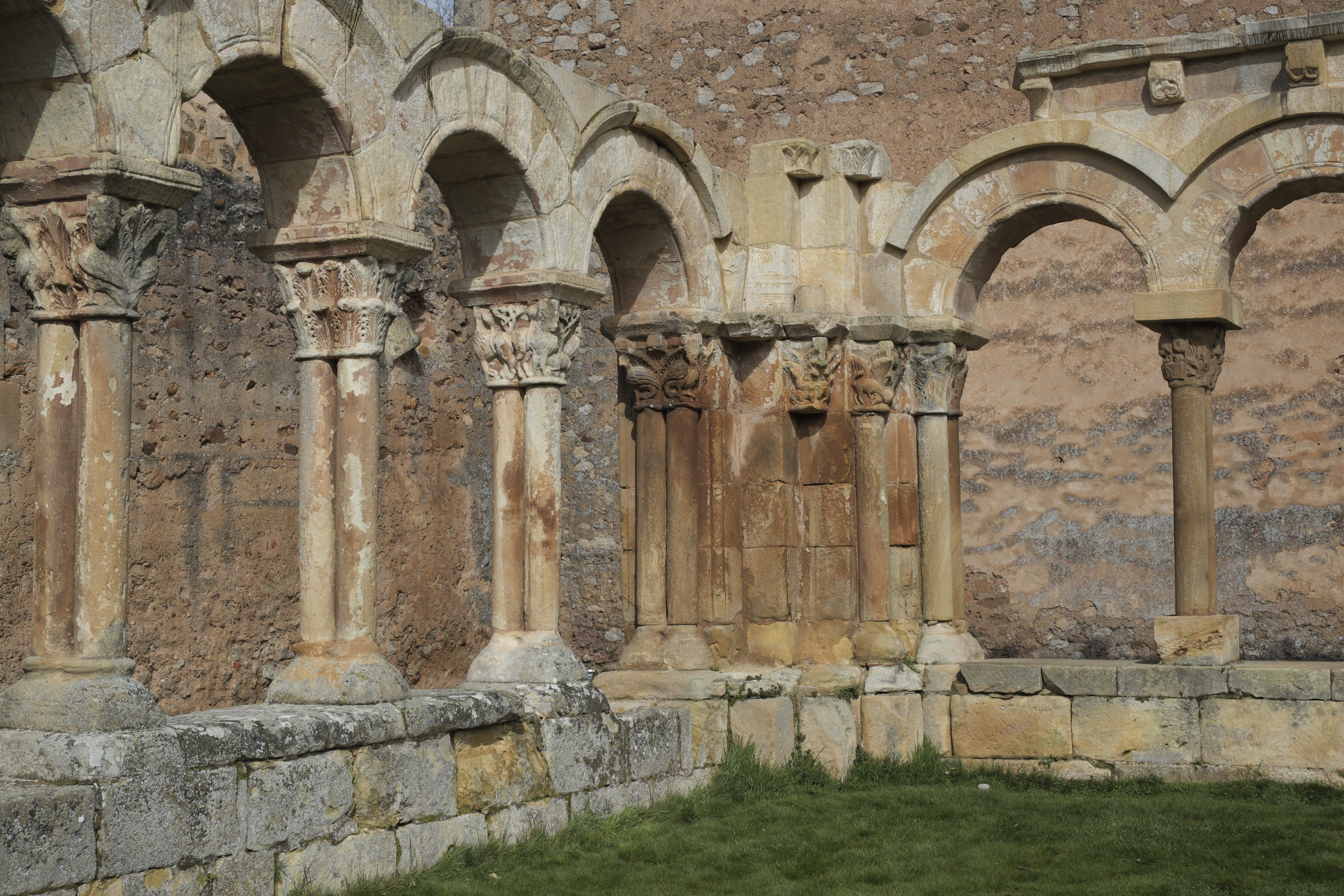 Kreuzgang des ehemaligen Johanniter-Klosters San Juan de Duero in Soria (Kastilien-León/Spanien)